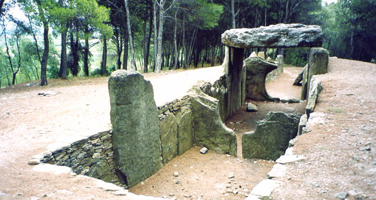 Description: Allée couverte du Mourel das Fadas (ou Mourel des fades, Mourel des Fées). France, Aude (11)Source: Hugo SoriaLicence: GFDL Hugo Soria